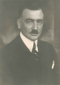 Porträtfotografie von Hans von Chamier Glisczinski